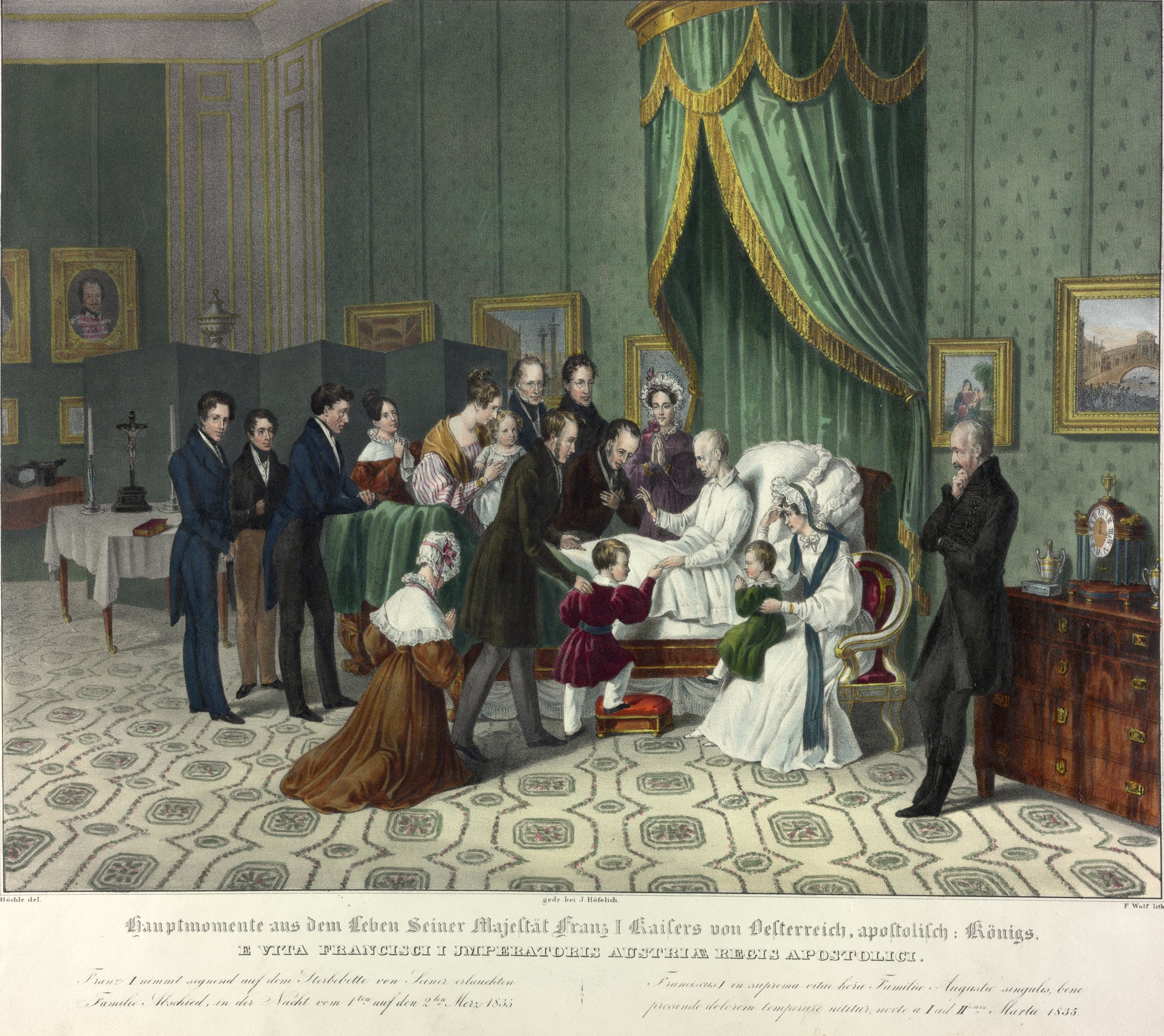 Kaiser Franz I. nimmt am 1. 3. 1835, dem Vorabend seines Todes, Abschied von den Angehörigen seiner Familie. Lithographie von Franz Wolf nach einer Vorlage von Johann Nepomuk Hoechle, aus der Serie „Hauptmomente aus dem Leben Sr. Majestät Franz I.“